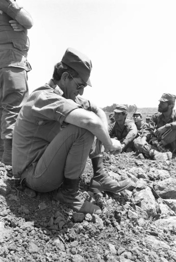 Depicted person: Avigdor Ben-Gal – Israeli general